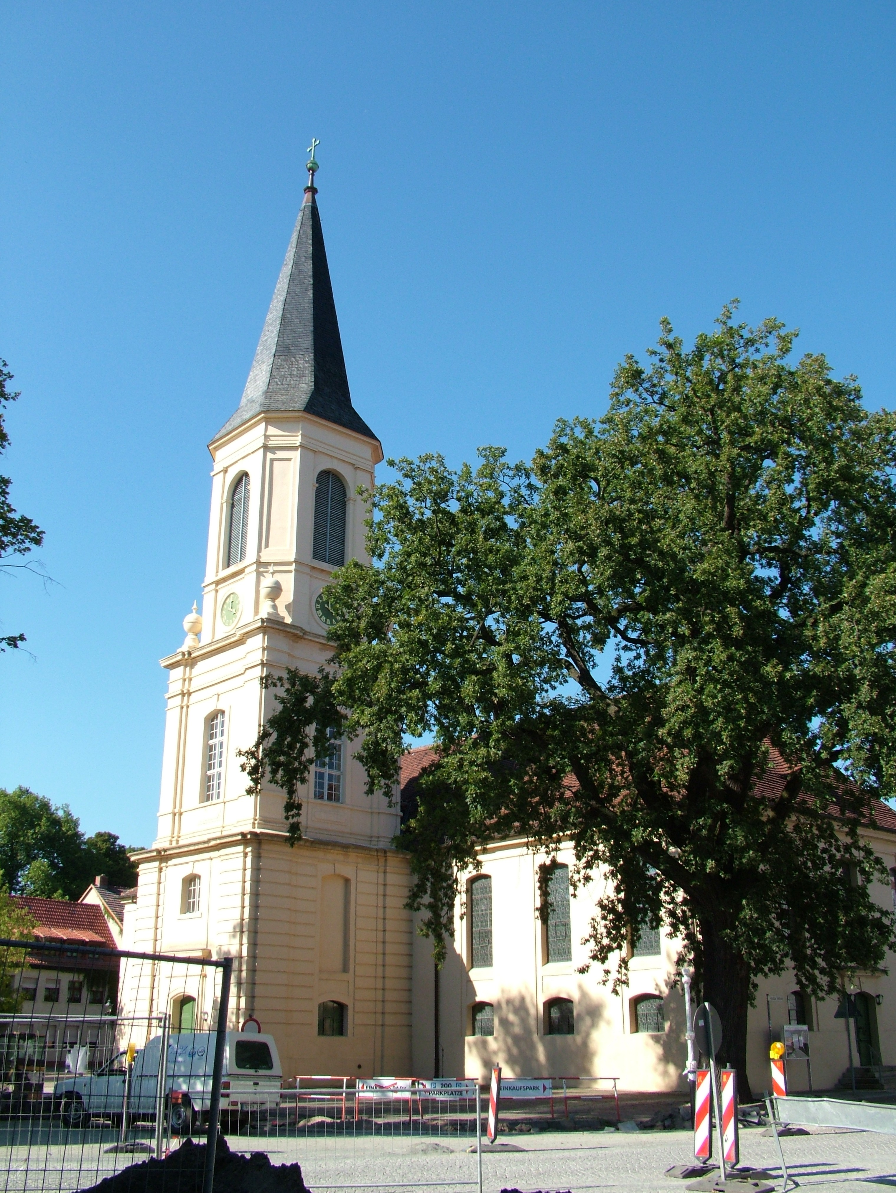 Die Kirche in Zossen / Brandenburg / Deutschland. Selber fotografiert am 31.08.2005.